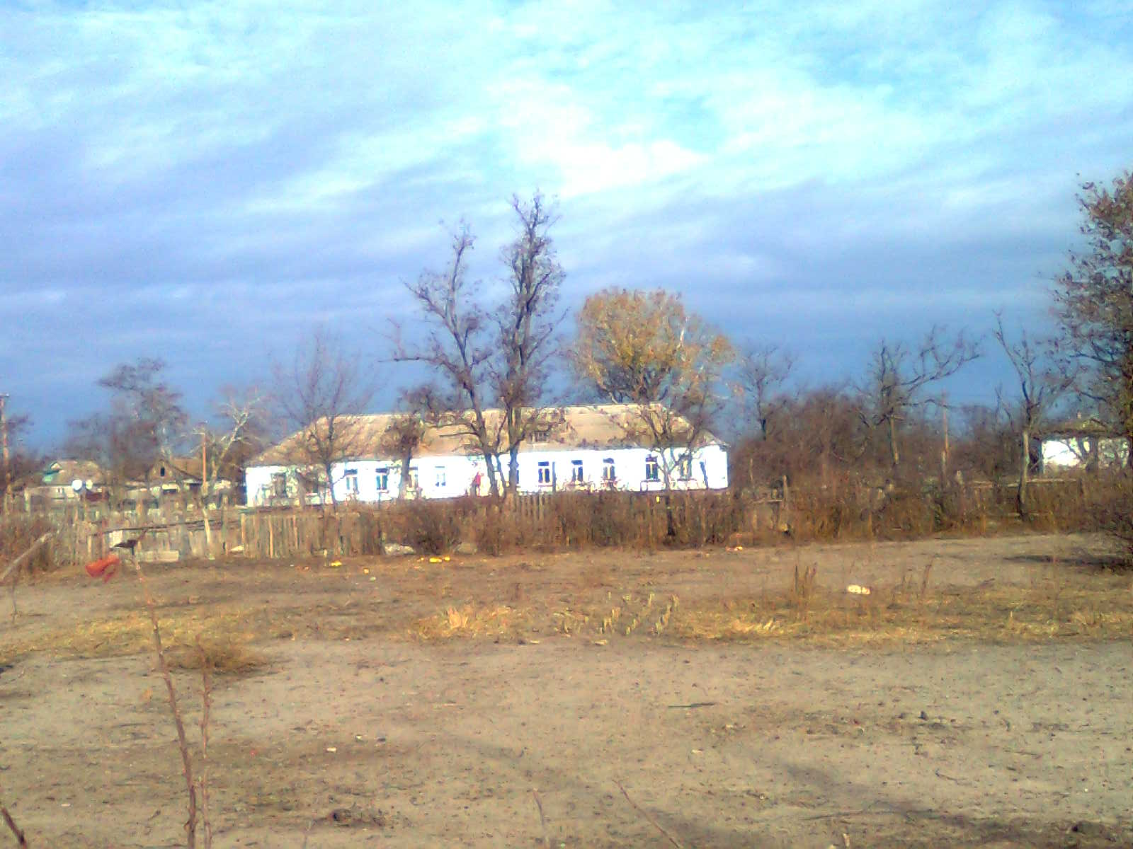 Фото